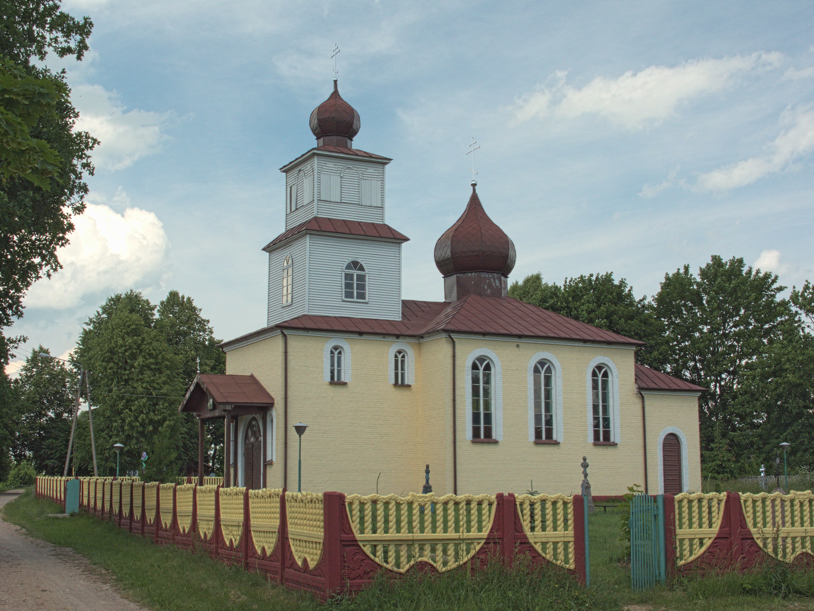 Cerkiew pod wezwaniem Przemienienia Pańskiego w Sasinach.